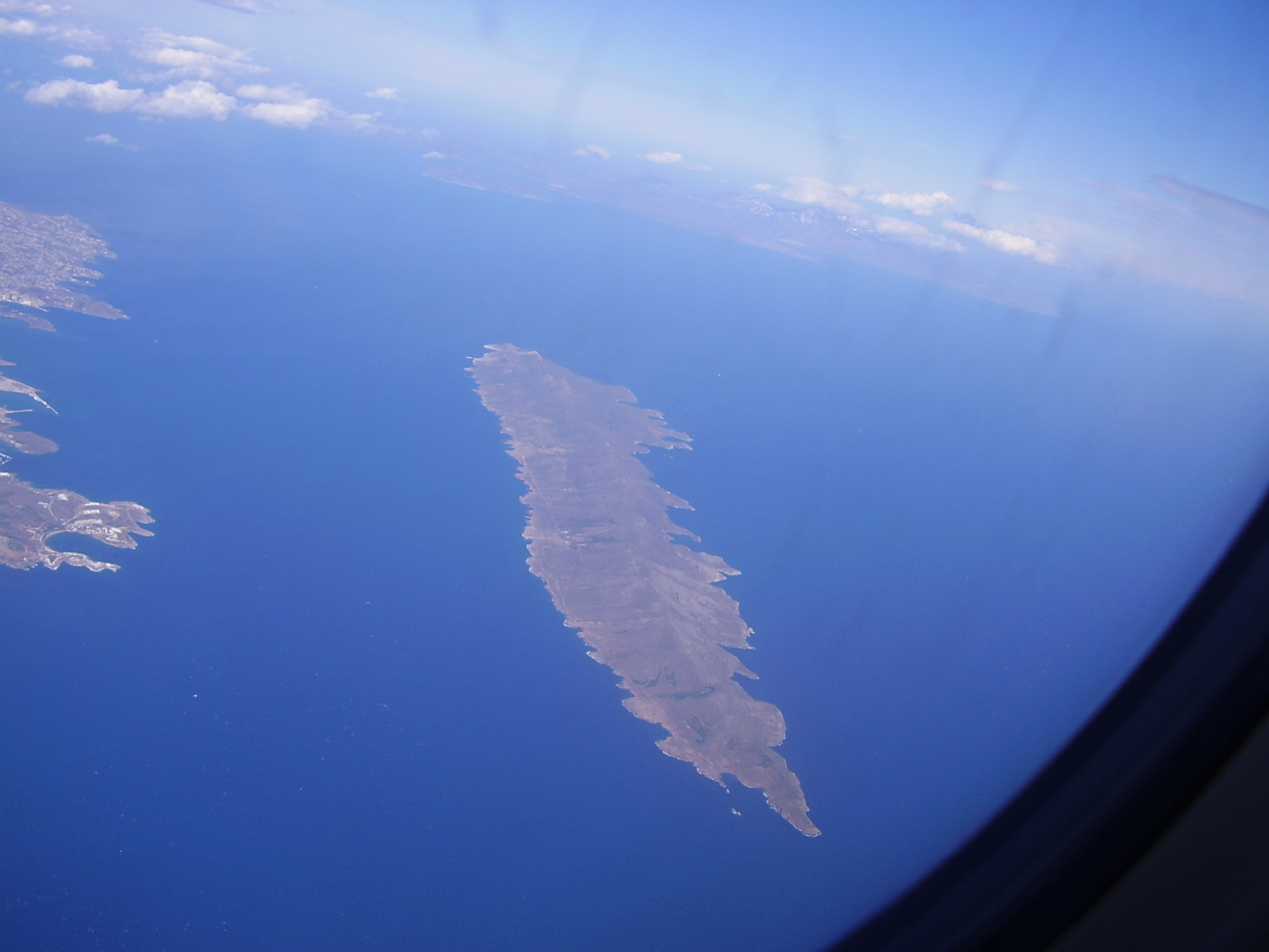 Grecka wyspa Makronisos, przedstawiona tak, jak widywana jest również podczas lotów rejsowych z Polski. Zdjęcie wykonano w momencie zwrotu samolotu, czyli niezwłocznie po minięciu przylądka Sounio. Po lewej stronie fotografii widoczny jest brzeg Attyki, na nim m.in. zewnętrzne fragmenty portu dalekomorskiego w Lawrio. U góry fotografii, czyli już z tyłu za samolotem, oddala się wyspa Evia (Eubea).